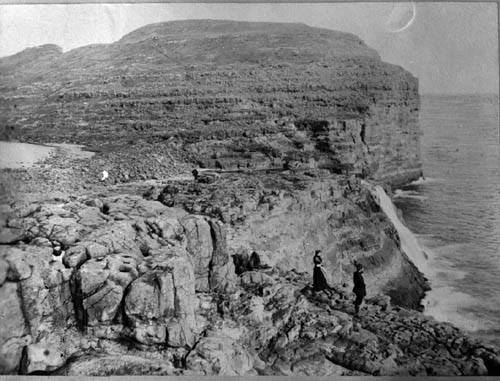 The waterfall Bøsdalafossur at Lake Sørvágsvatn at Sørvágur, Faroe Islands